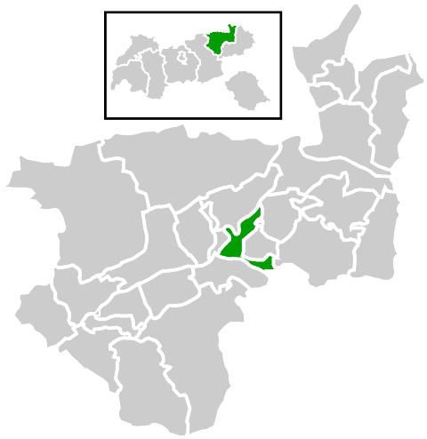 Lage der Gemeinde innerhalb des Bezirks Kufstein